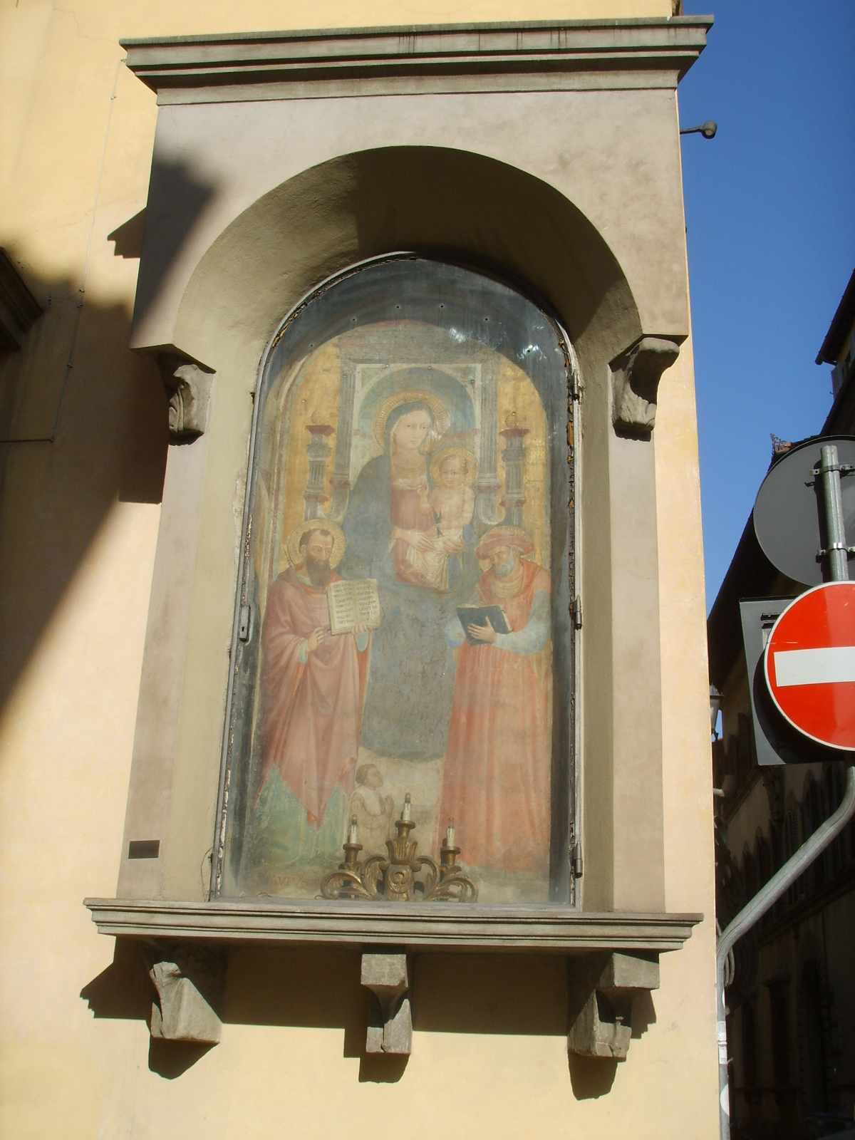 Tabernacolo del Canto alla Cuculia, via di santa monica